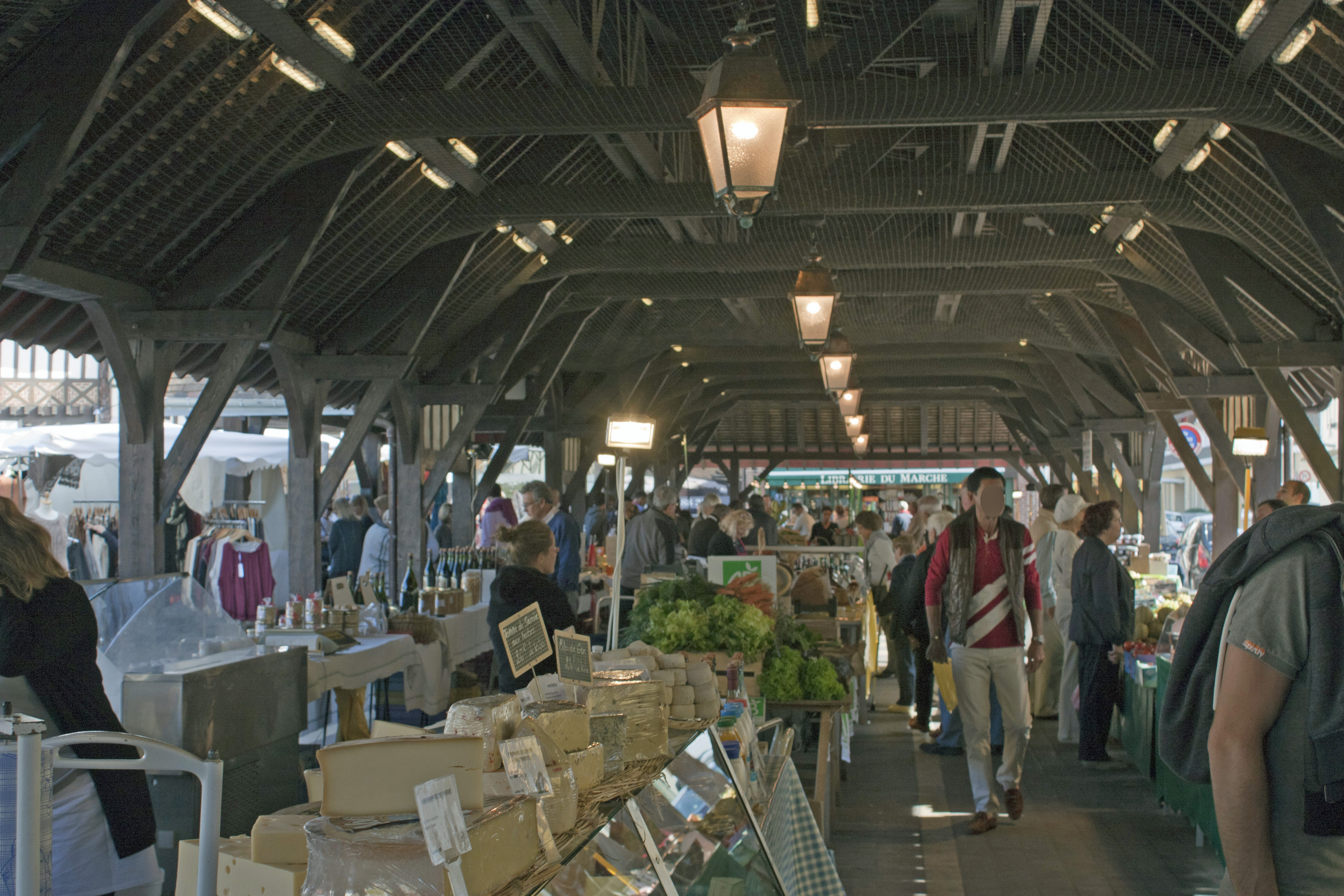 Covered market Hall in Deauville.